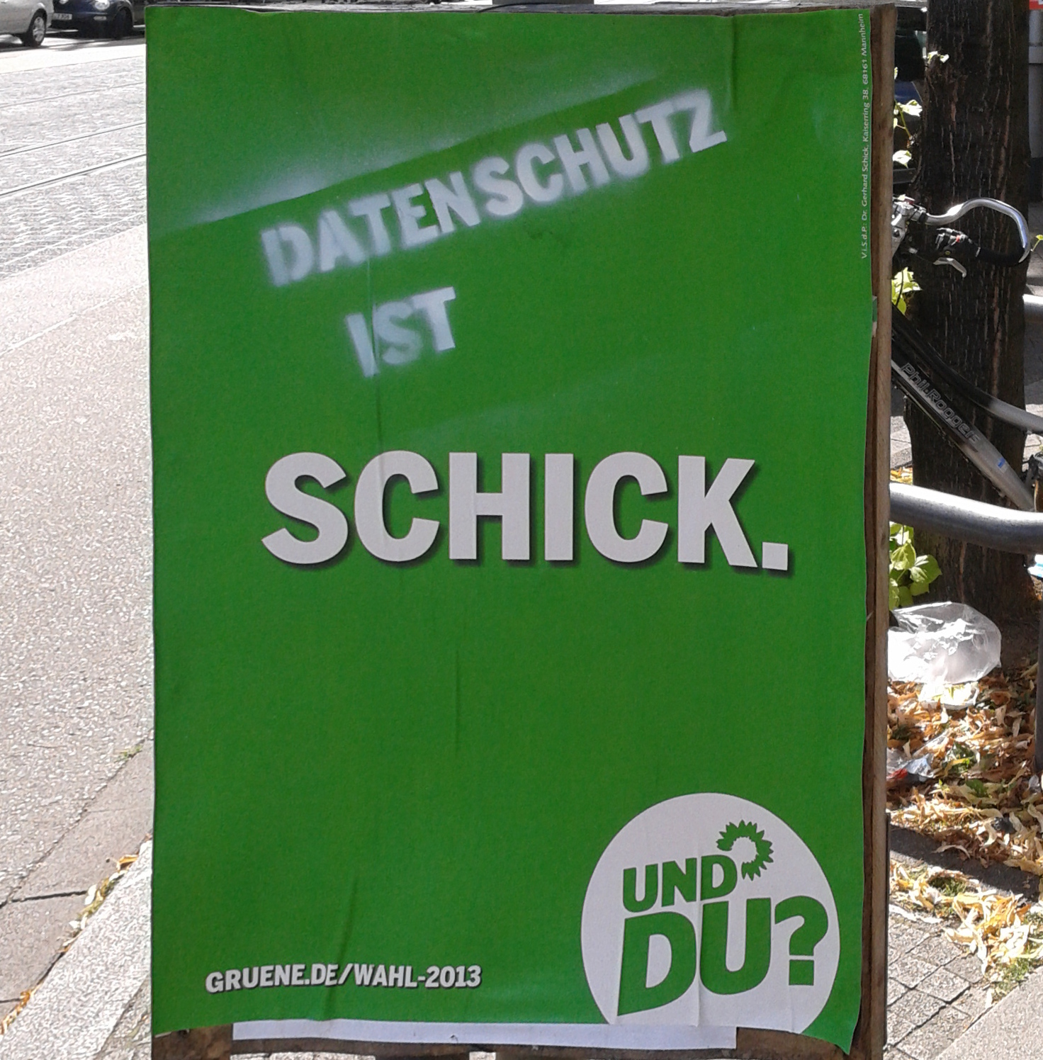 Eine Information zur Bundestagswahl 2013 von den Grünen